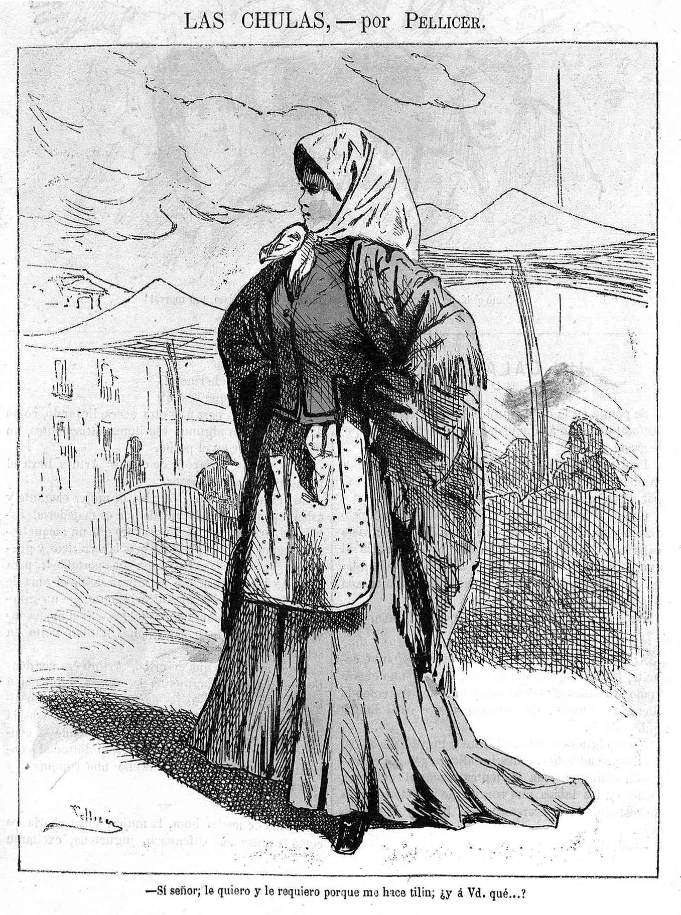 Las chulas, en la revista satírica española Gil Blas.